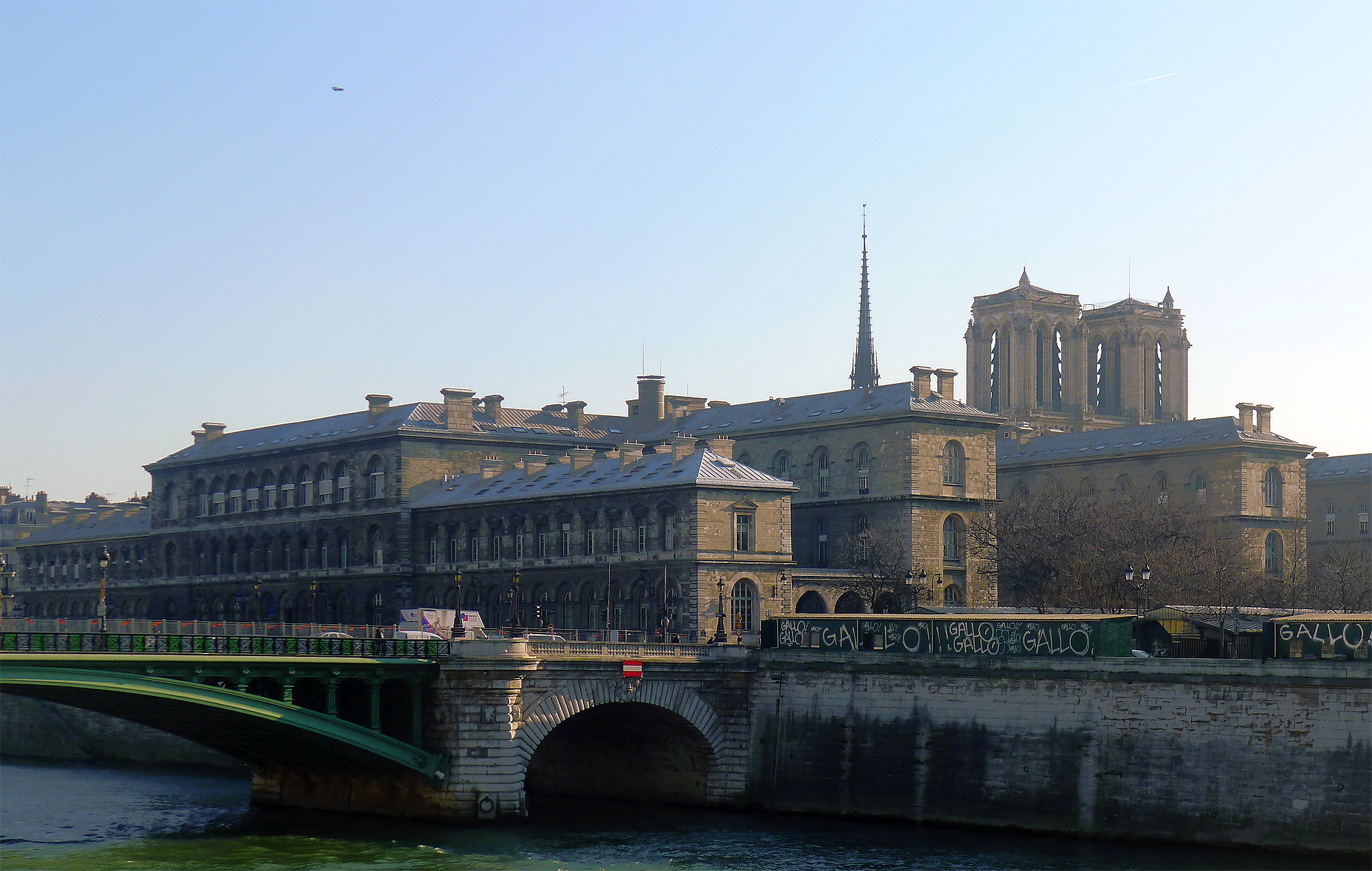 Pont Notre-Dame et Hôtel-Dieu - Paris IV